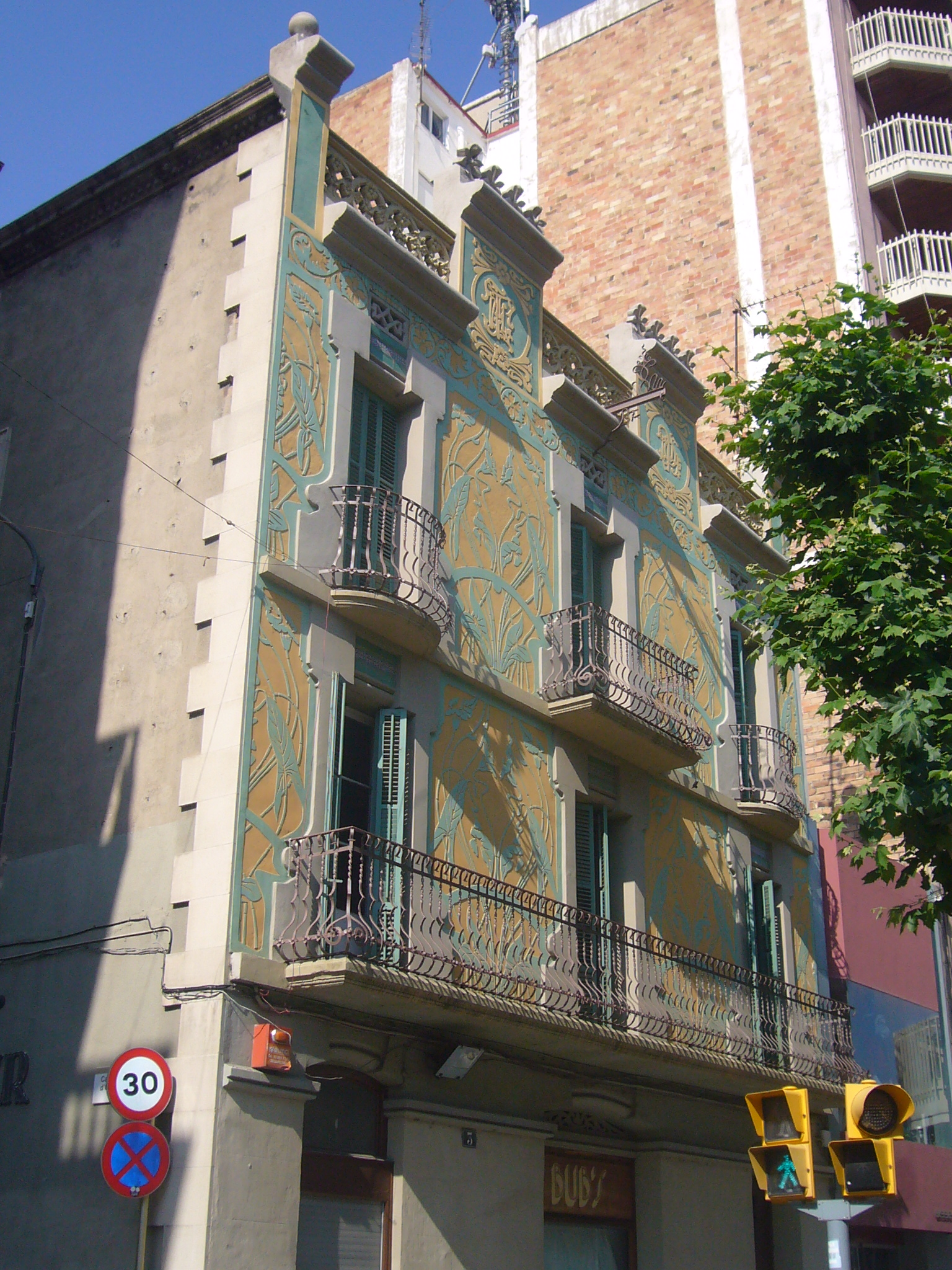 Casa Llorenç Ferrer o Cal Basté: Edifici modernista ubicat al número 1-3 de la rambla del general Vives d'Igualada, arranjat pel mestre d'obres Antoni de Facerias i Marimón entre 1903 i 1904. Data del projecte: 6 octubre 1903. Plànols: Lligall 1903 - Lletra F. A la façana destaquen els seus esgrafiats de lliris de composició simètrica, on les flors són pintades de color fosc sobre fons clar, característica del modernisme contraposant-se a l’esgrafiat tradicional. La decoració pictòrica la trobem al sostre de l’entrada, amb una composició de sanefes de temàtica floral. Una de les habitacions del primer pis conserva el paper pintat de la paret i una composició figurativa d’una dóna pescant pintada al sostre.